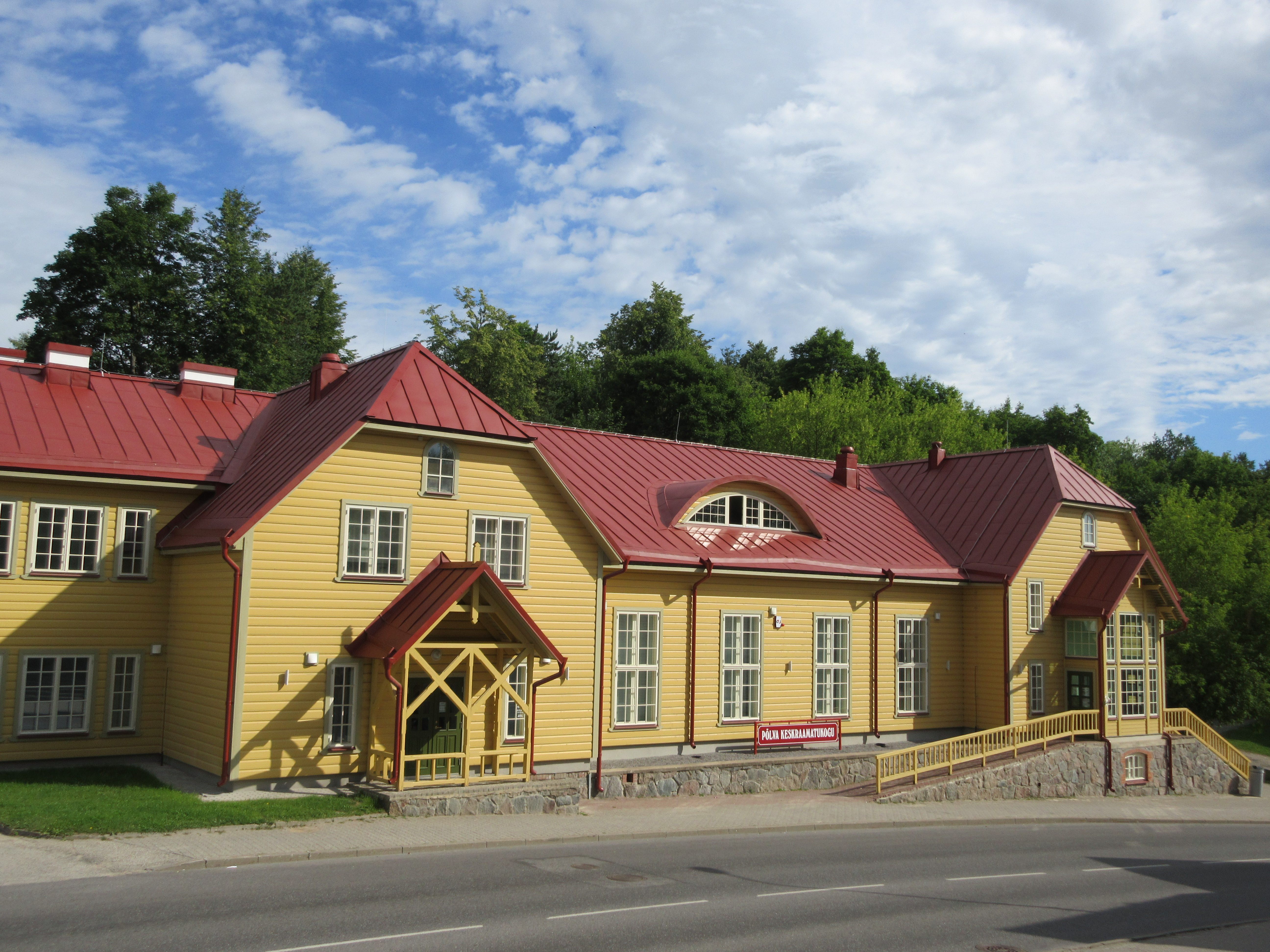 Põlva Keskraamatukogu hoone 2018. a